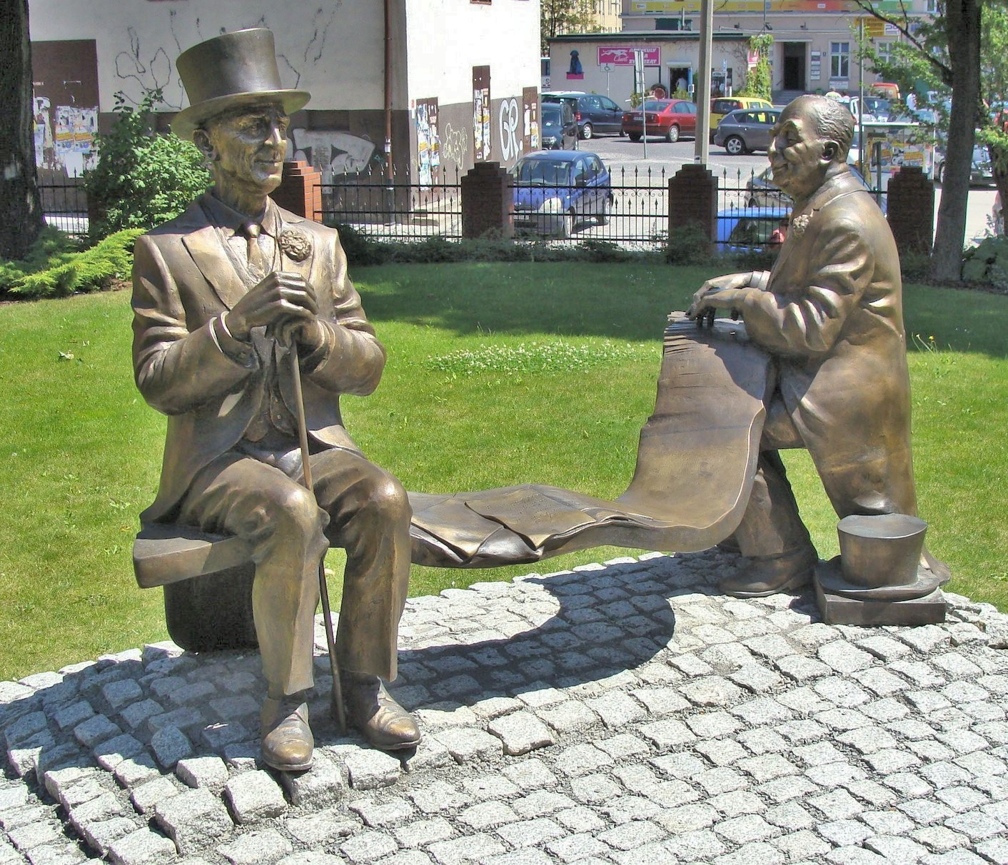 Starsi Panowie dwaj - dzieło Mariana Molendy na wzgórzu uniwersyteckim w Opolu